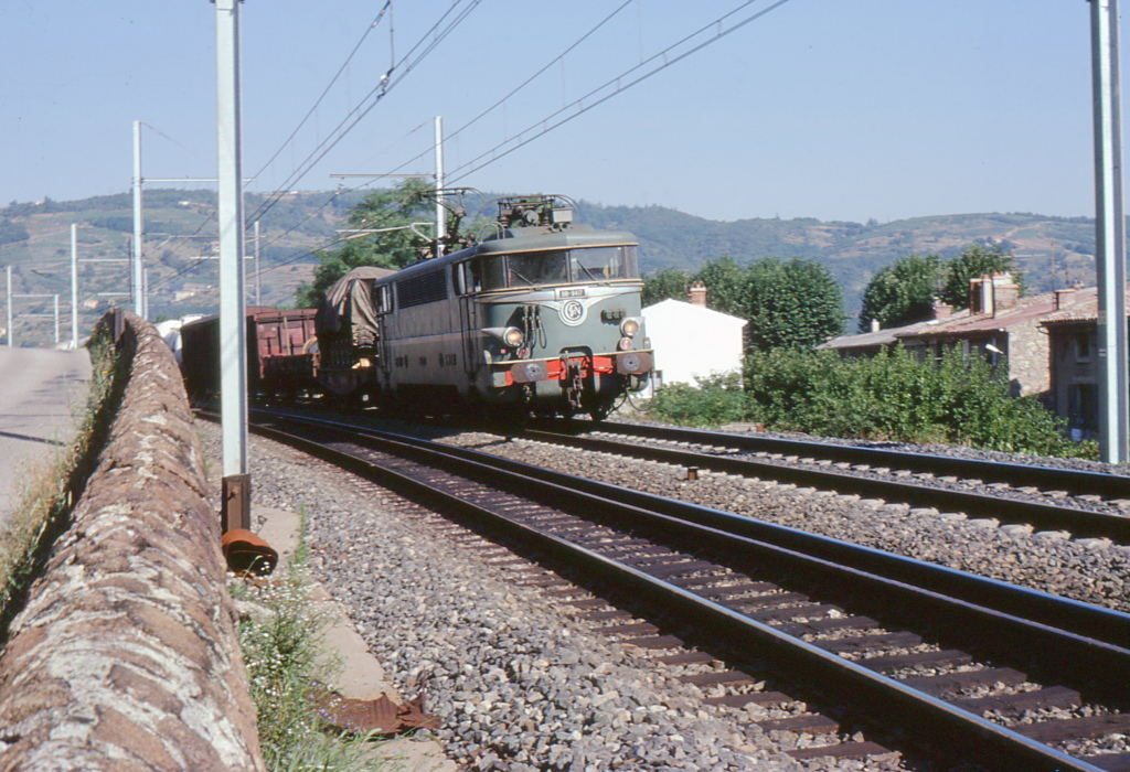 Voies SNCF et CF du Vivarais près de Tournon.